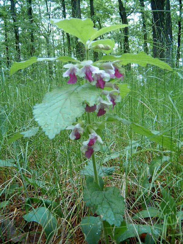 Česky: Medovník meduňkolistý Přírodní park Baba